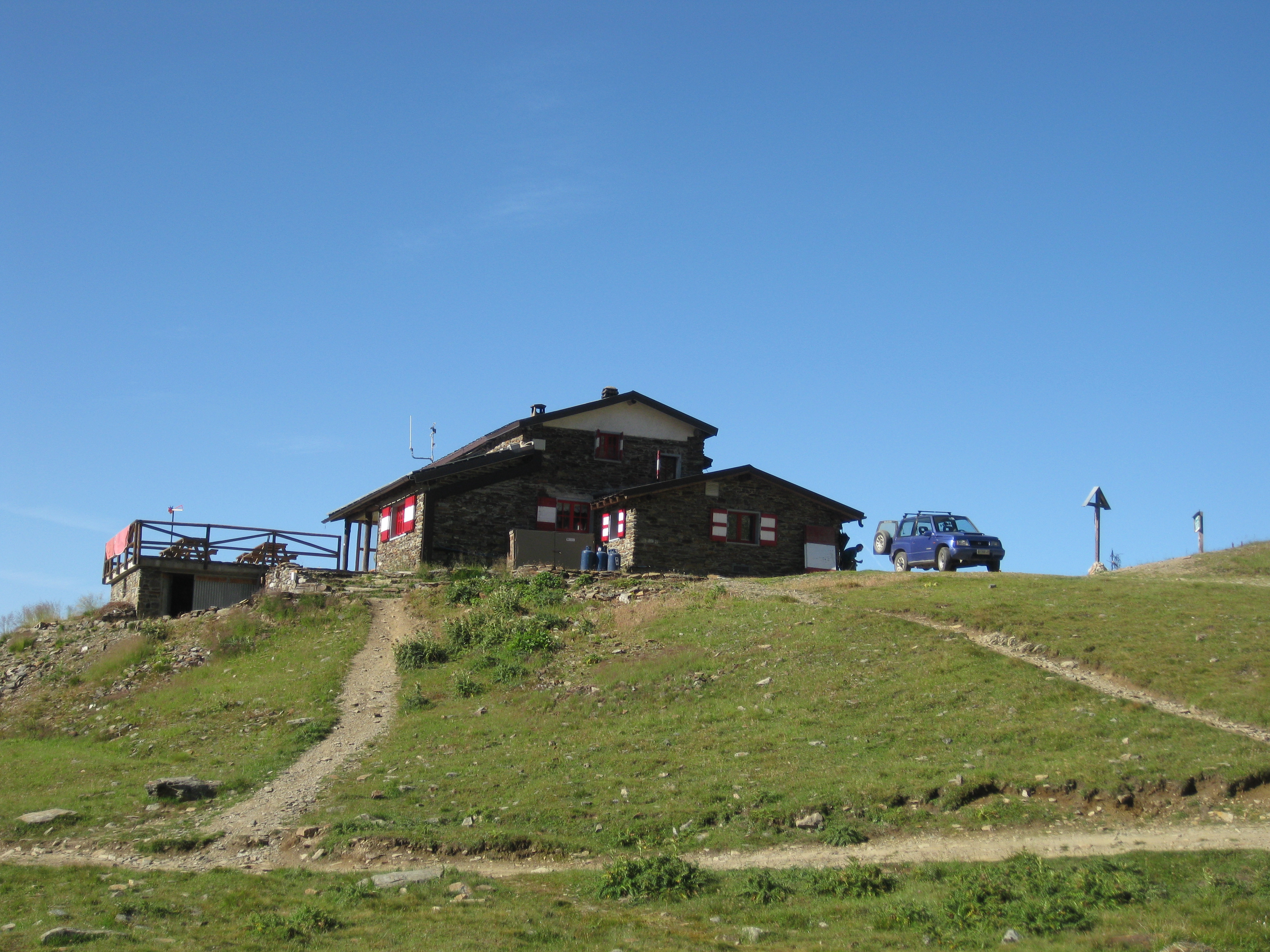 il rifugio bozzi cioè la ex caserma.